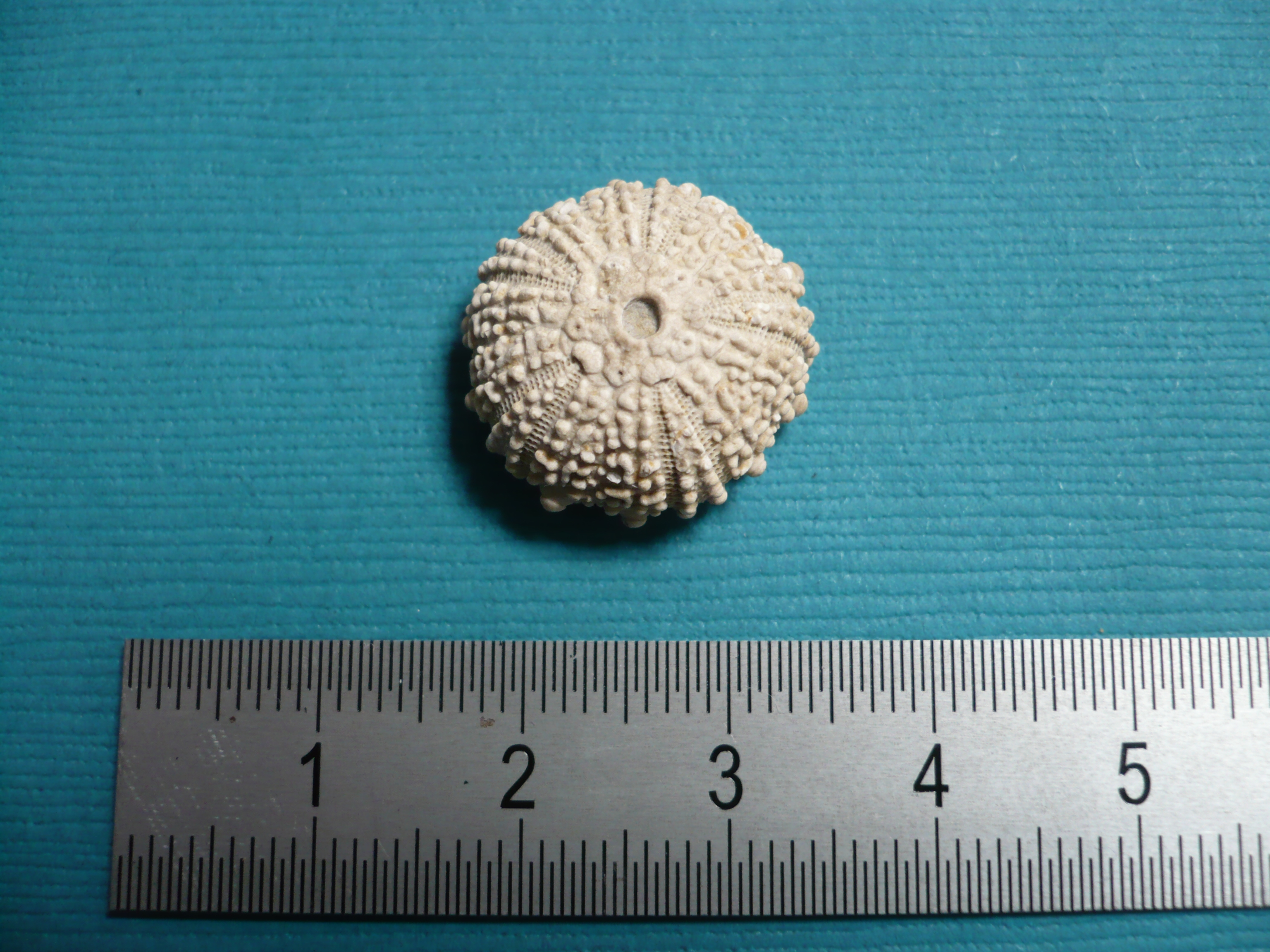 Glypticus hieroglyphicus à Charmes-la-Côte (54113, Meurthe-et-Moselle, Lorraine, France). Vue aborale.